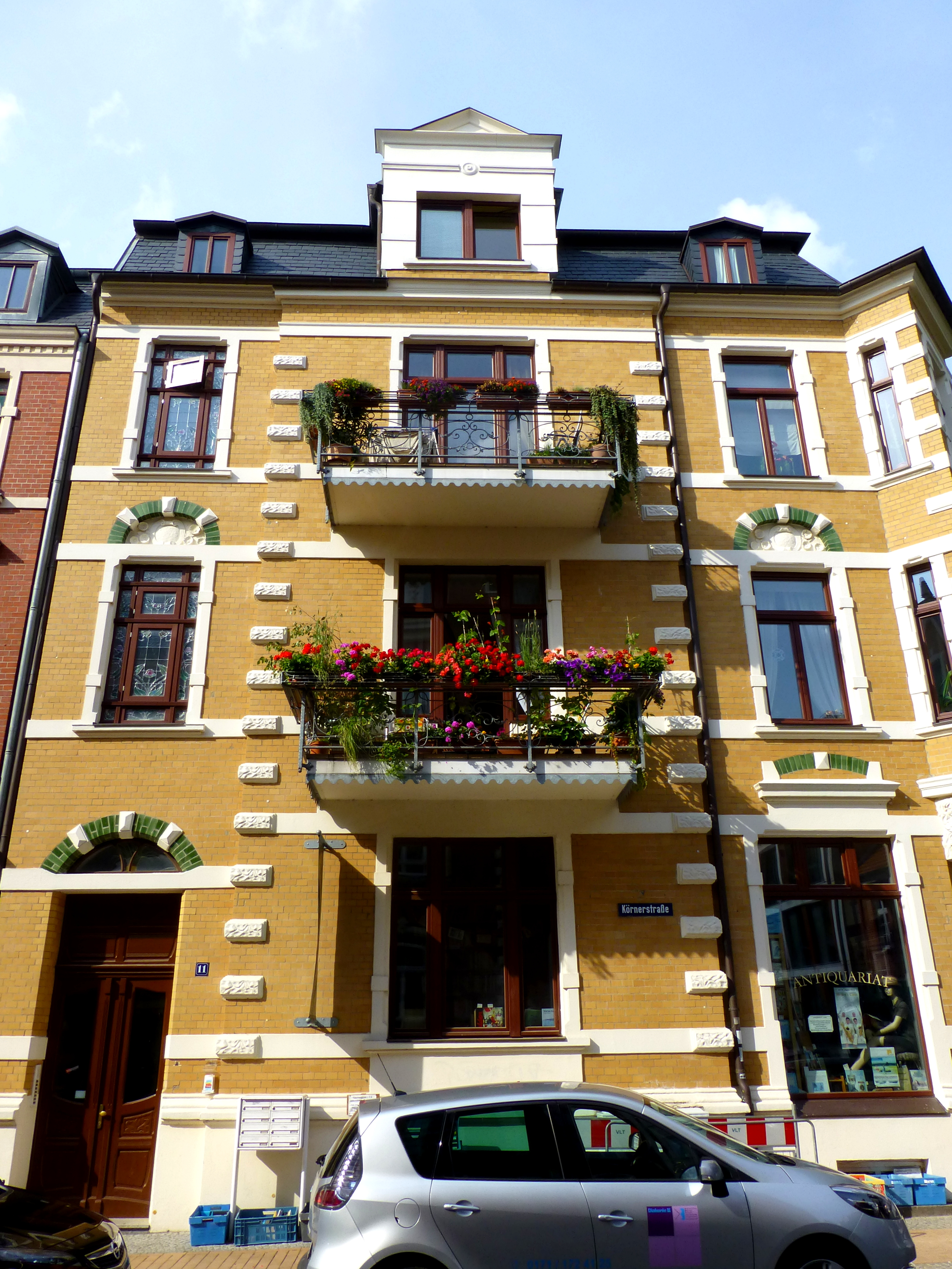 Schwerin – Antiquariat-Loest Körnerstraße 11